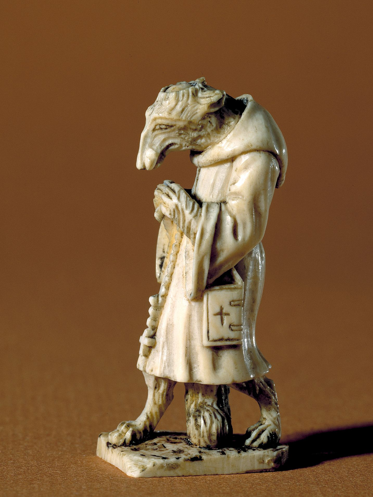 Satire over gejstligheden var velkendt i middelalderen. Men den lille ca. 6 cm. høje elfenbensfigur af en ræv i munkedragt og med rosenkrans i poterne hører godt hjemme i den antikatolske propaganda omkring Reformationen. Jordfund fra København.